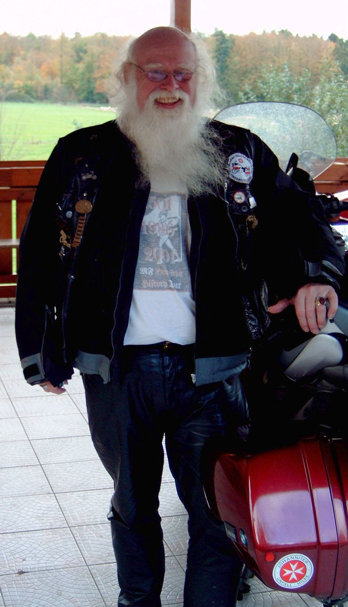 Bildbeschreibung: Karl August von Dahl Quelle: eigene Fotografie Fotograf: Achim Berg 10:00, 24 October 2006 (UTC) Datum der Aufnahme: 24.10.2006